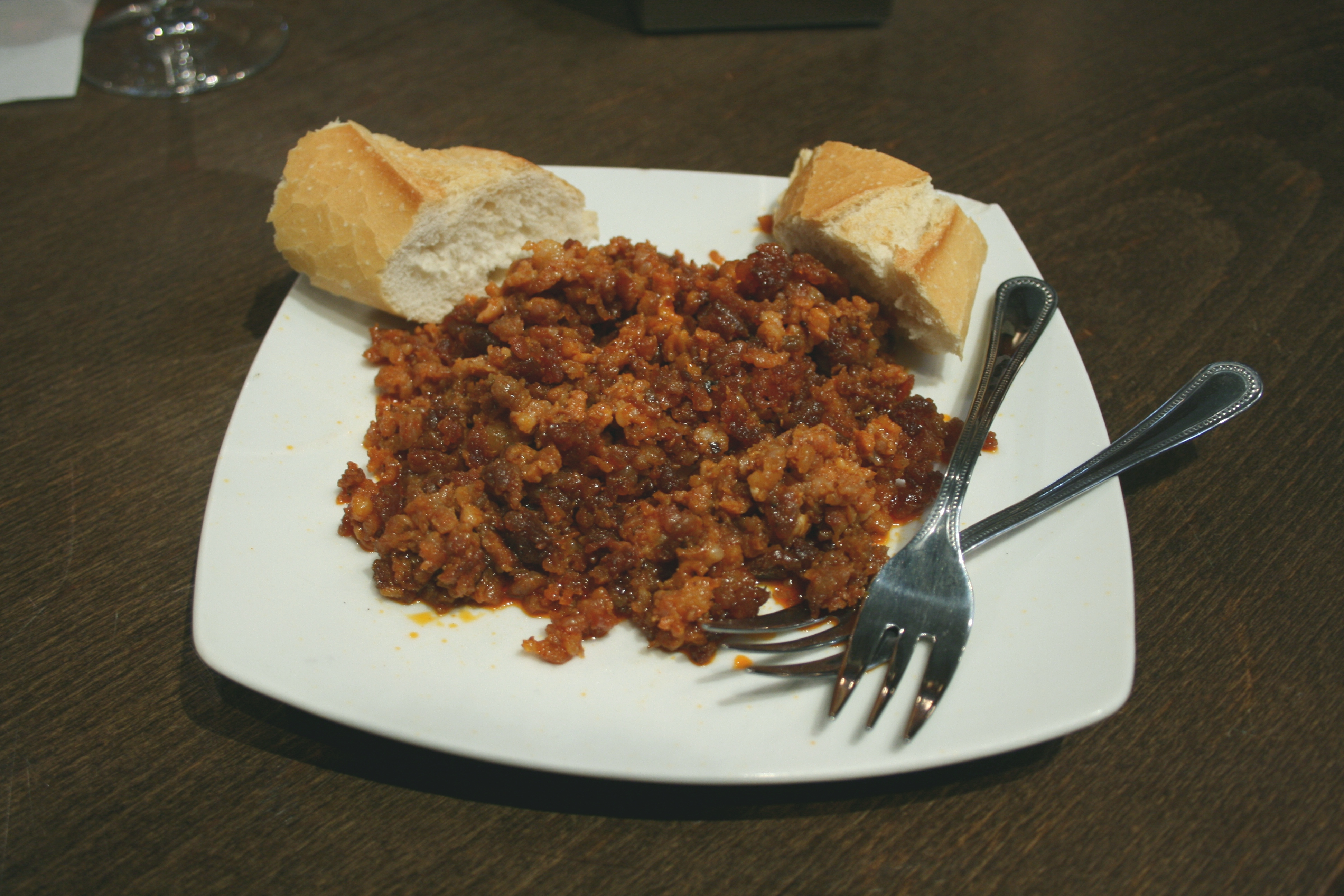 Picadillo